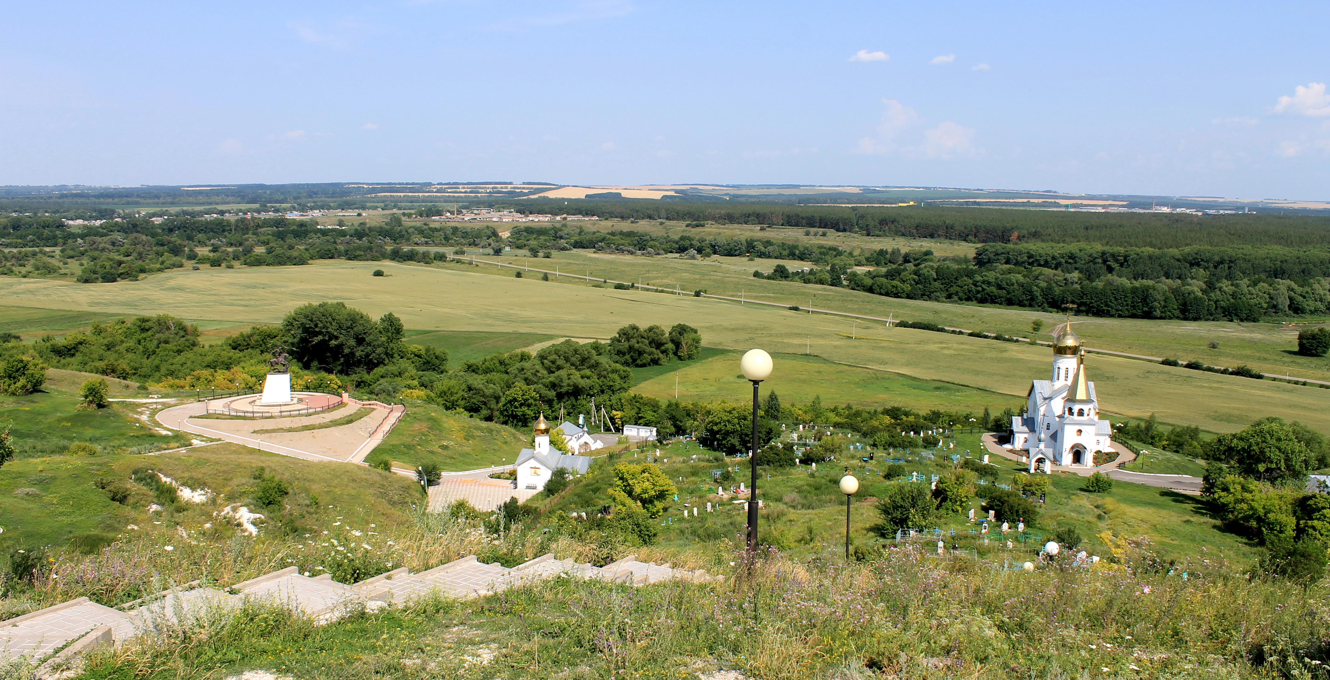 Холковский Свято-Троицкий монастырь. Общий вид